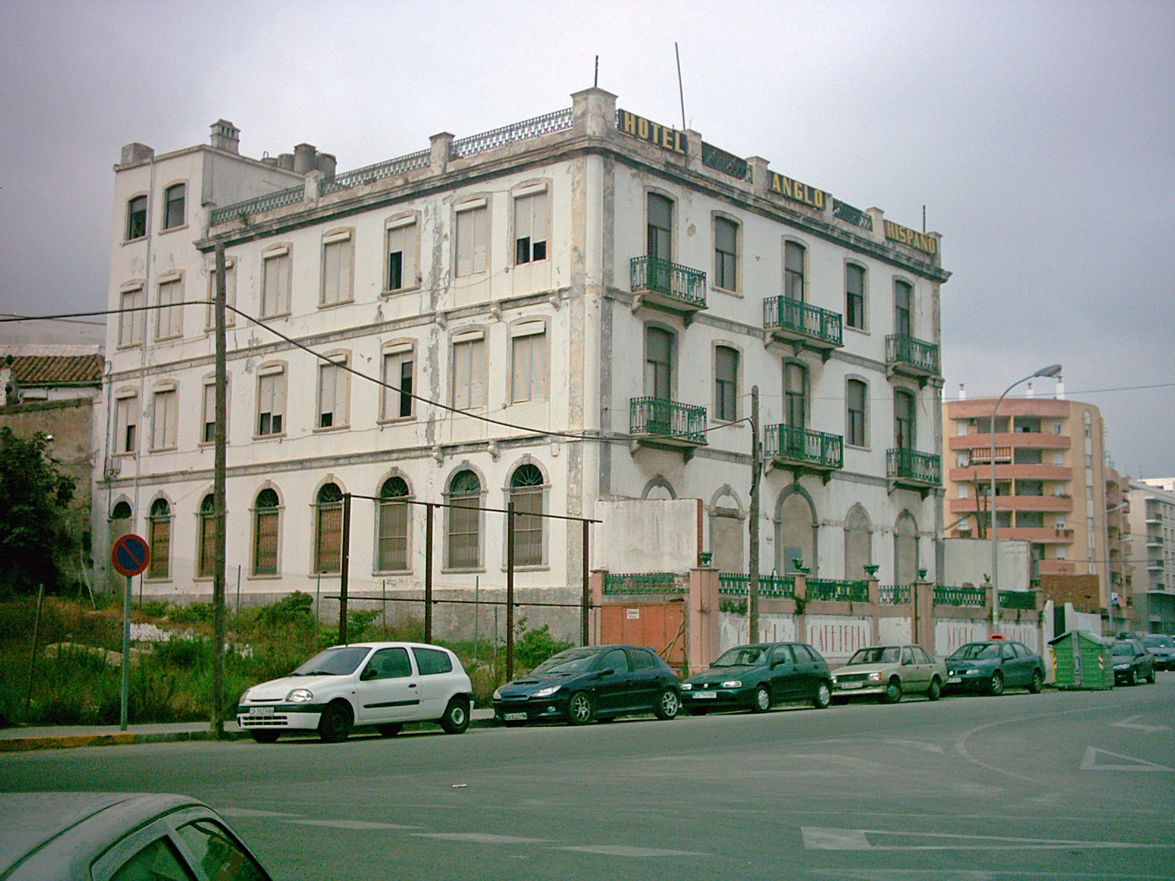 El Hotel Anglo Hispano de Algeciras en 2005, antes de su rehabilitación como bufete de abogados "Anglo Hispano".